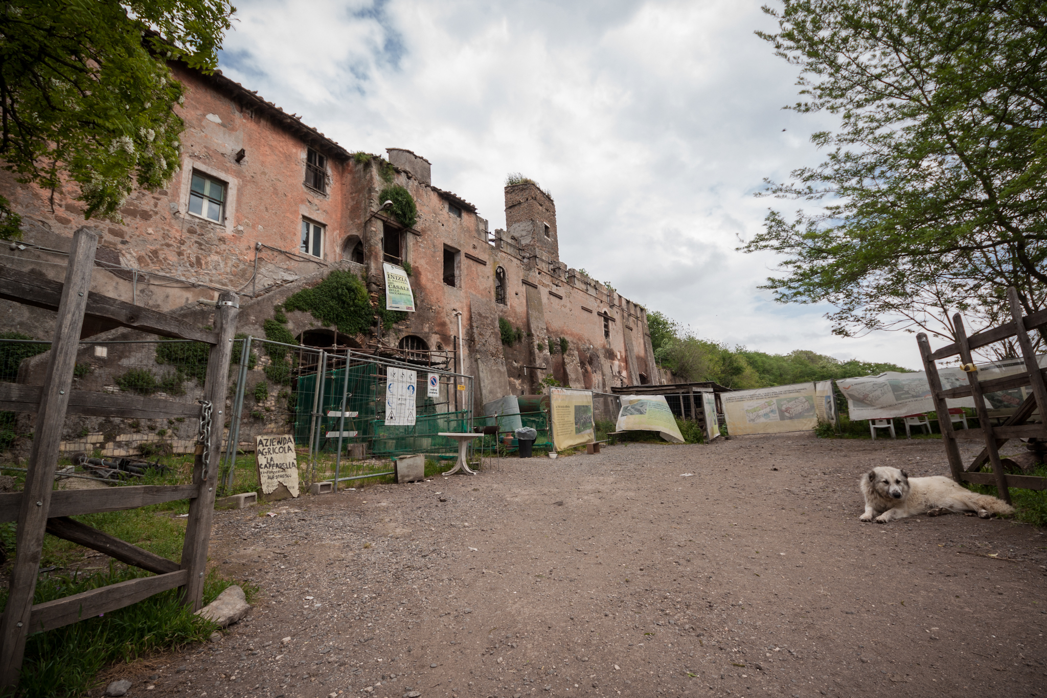 L'antico Casale della Vaccareccia, nel Parco della Caffarella, a Roma.